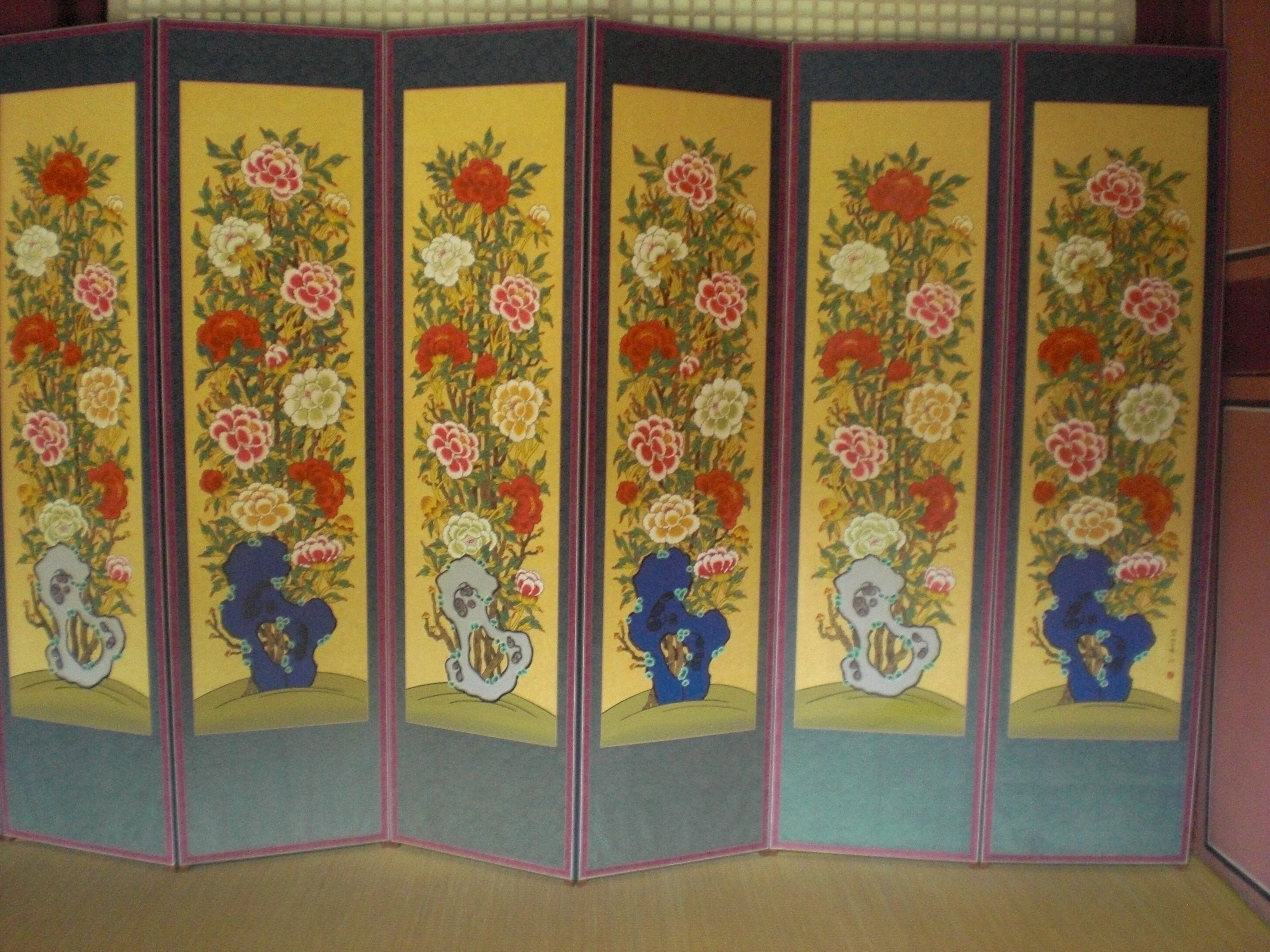 Ekranego en sanktejo Jongmyo de Seulo